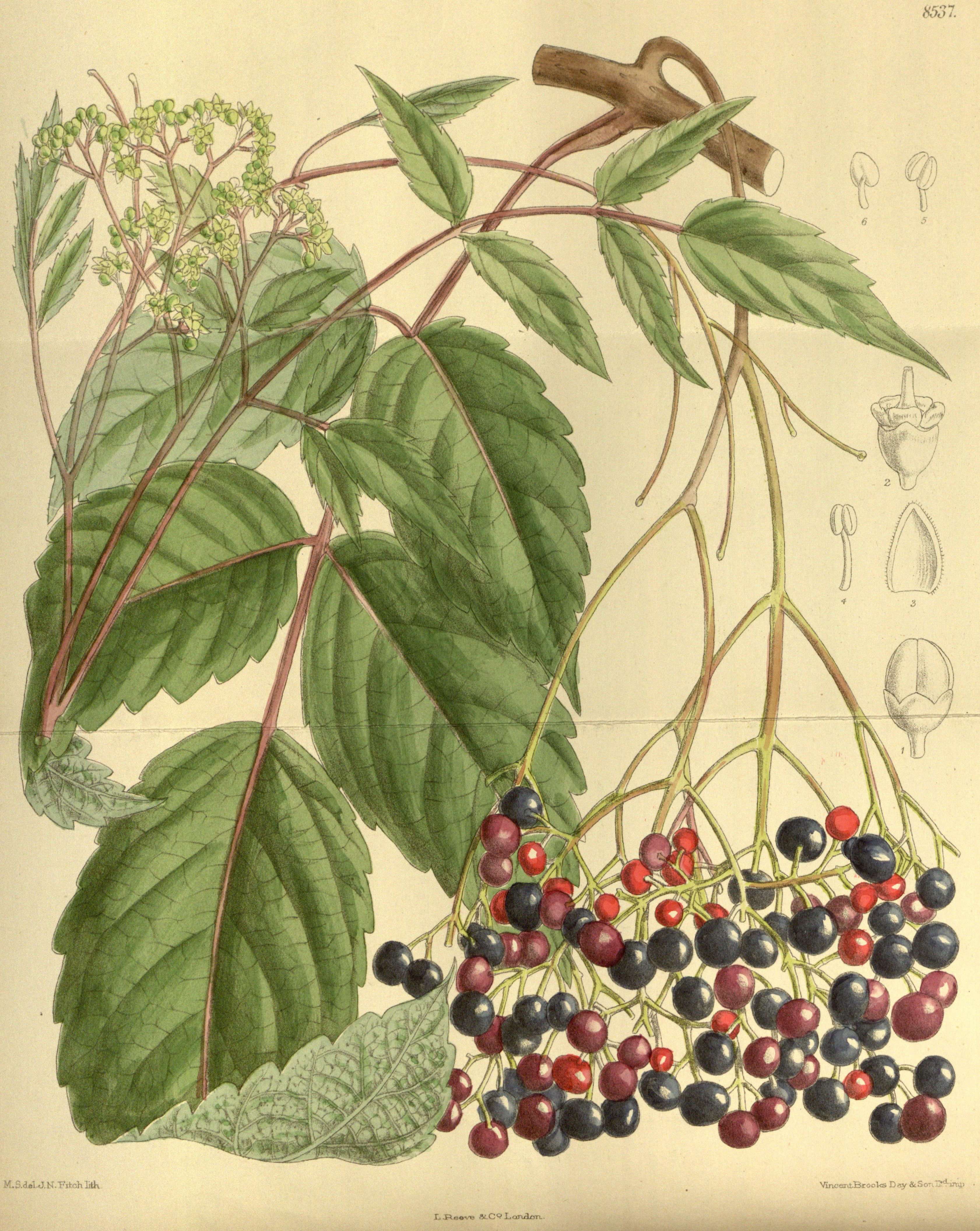 Ampelopsis megalophylla var. megalophylla, Vitaceae